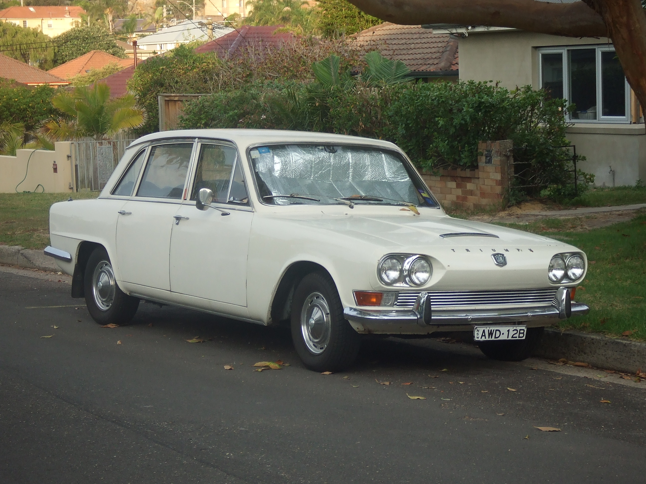 Triumph 2000 Mk1